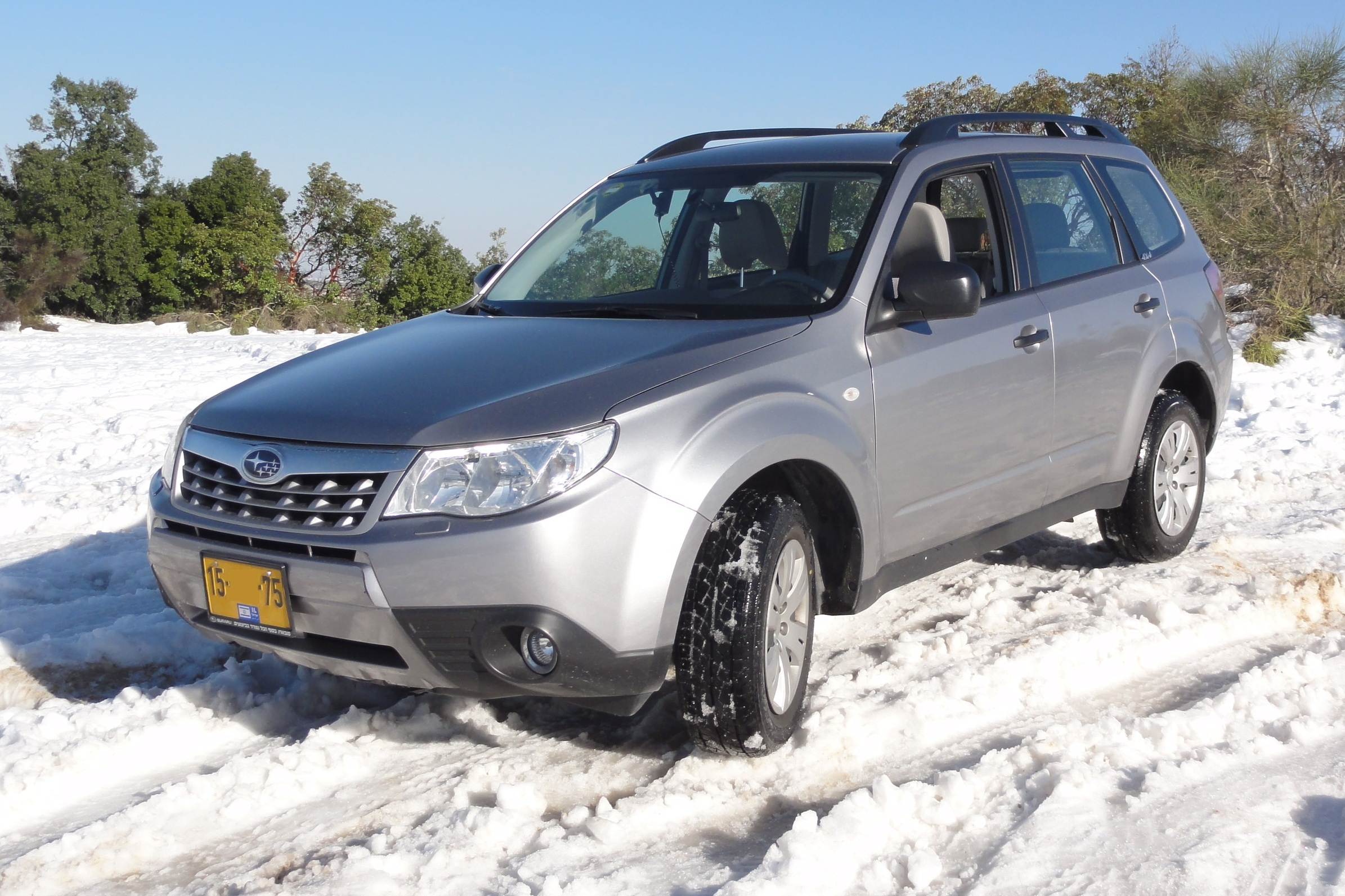 סוברו פורסטר מודל 2011